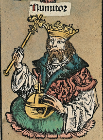 Зображення Нумітора у Нюрнберзькій хрониці.